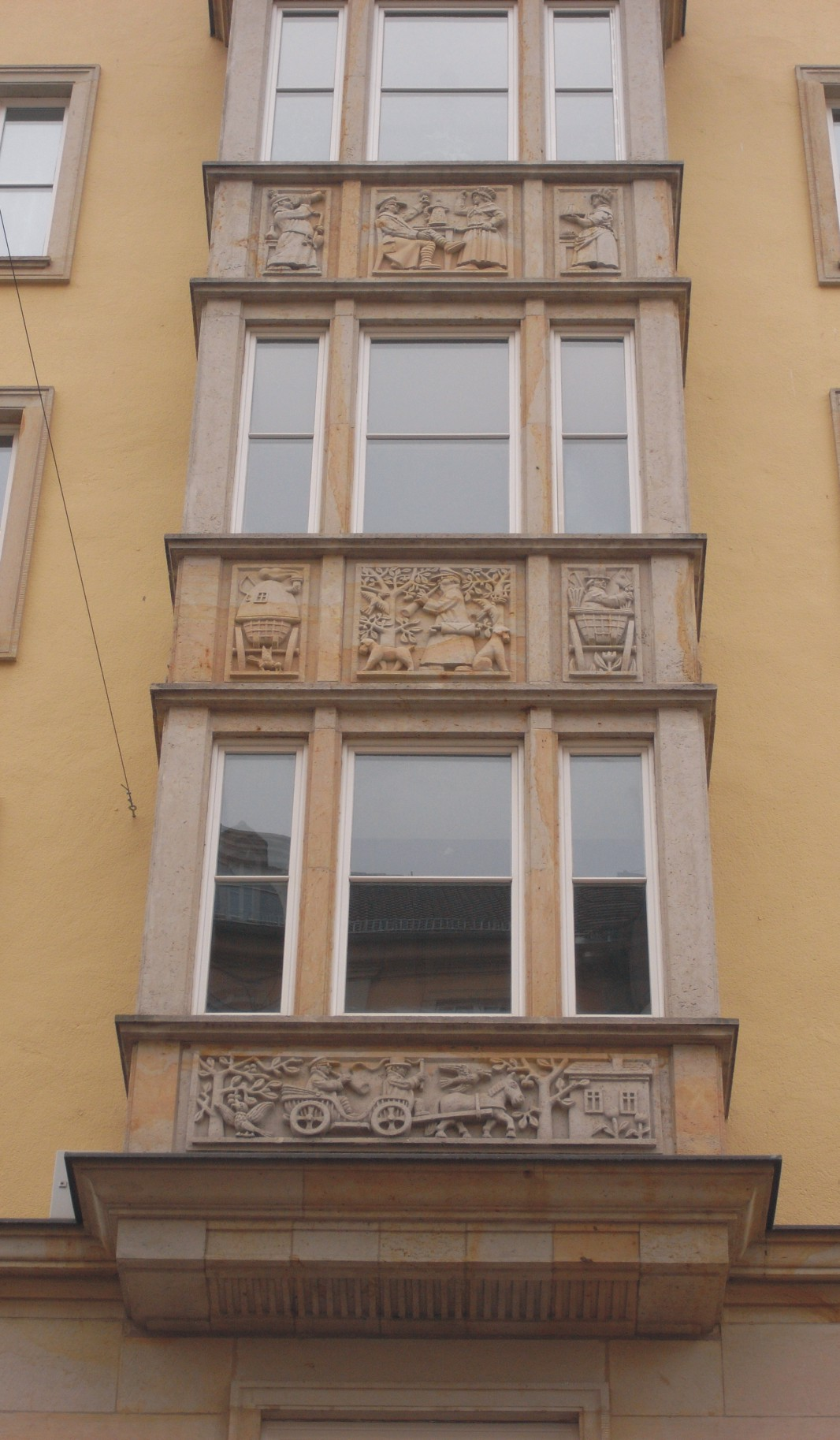 Weiße Gasse in Dresden, Erker mit Bildszenen (Sachsen, Deutschland)